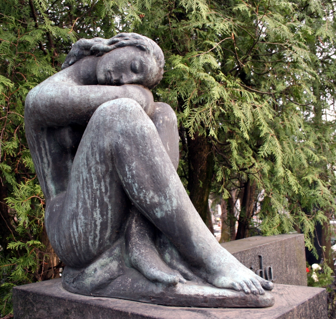 Tuga, djelo Antuna Augustinčića na grobu obitelji Vajda na Mirogoju, Zagreb, Hrvatska